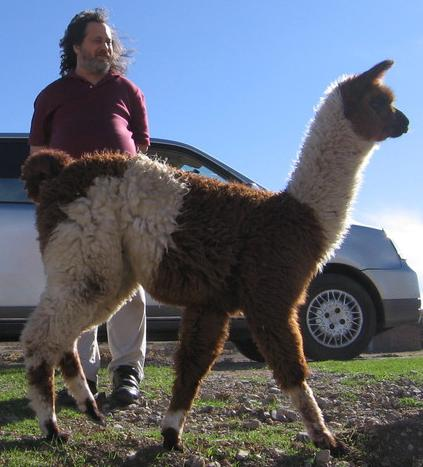 Stallman detrás de una alpaca camino a las Chullpas de Sillustani en Puno.